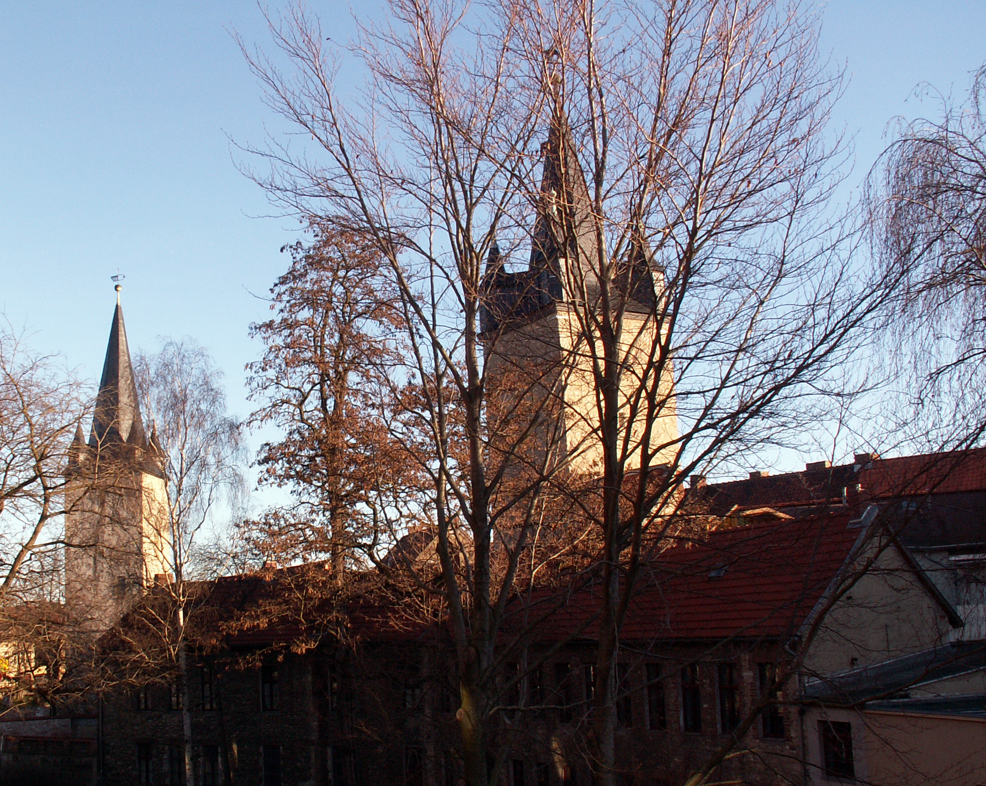 Türme der Stadtbefestigung in der Johannispromenade